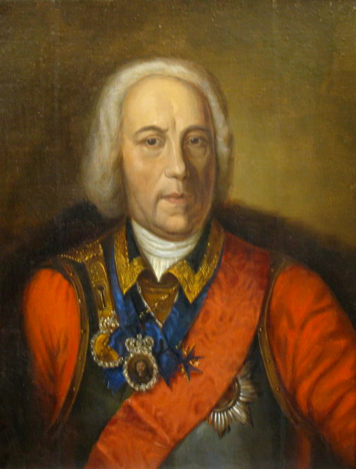 Вильгельм ("Вилим Иванович") де Геннин - горный инженер эпохи Петра I, основатель завода-крепости на реке Исеть, которую он нарёк Екатеринбургом.